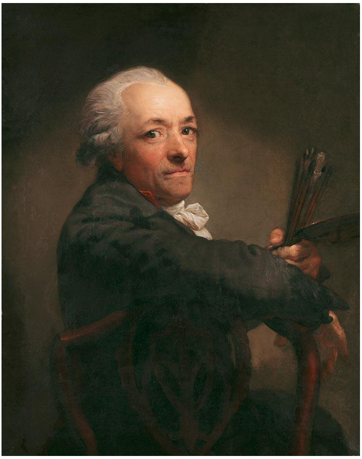 Teil-Replik des "Selbstporträts von Dresden"